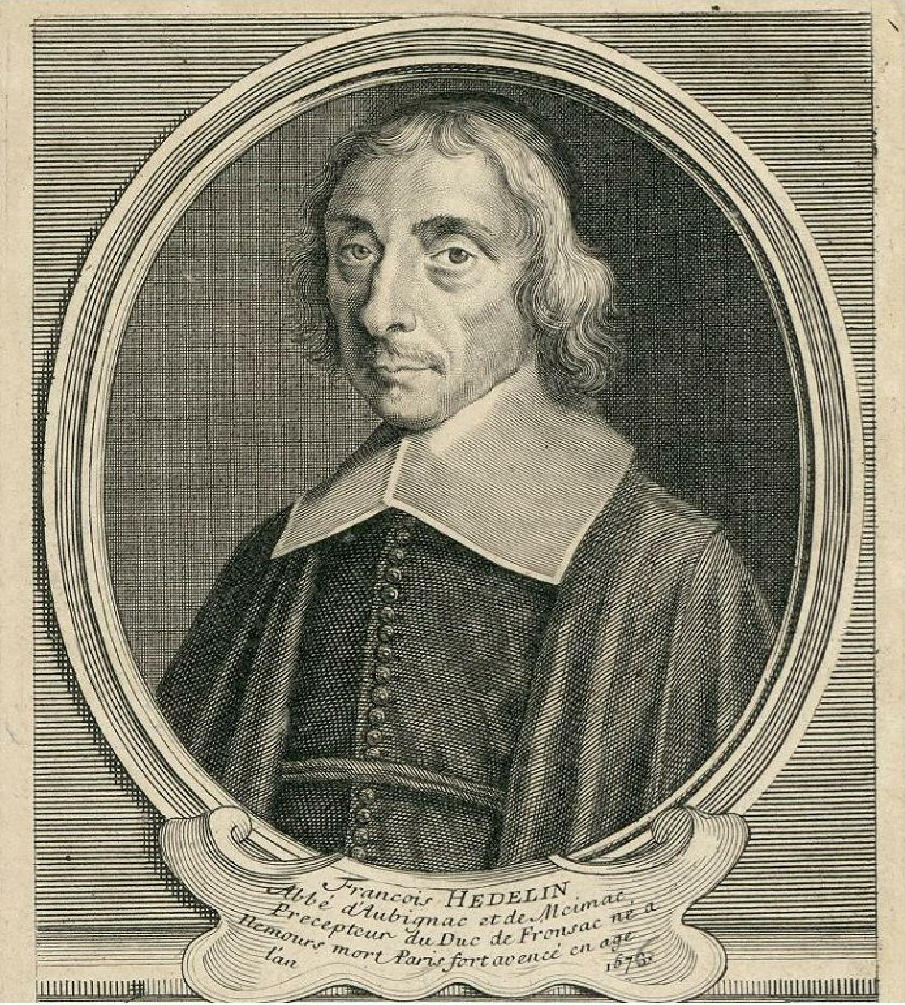 François Hédelin, dramaturge français (1604 - 1676)